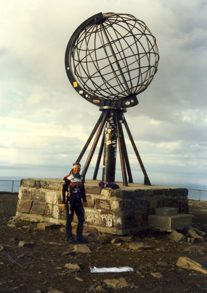 Lars Nielsen cykler til Nordkap og retur 2